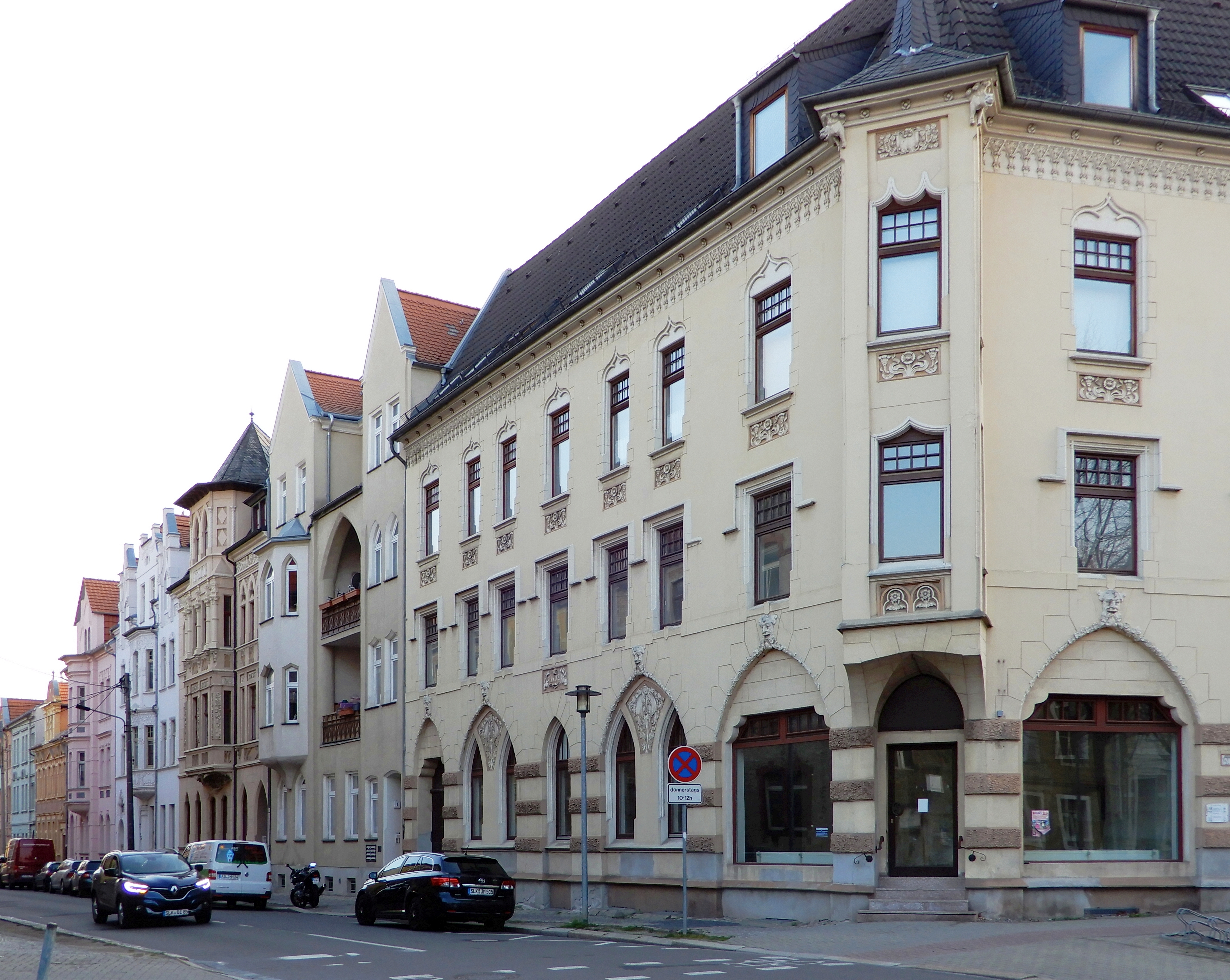 Gebäude Worthstraße 1-23 Ecke Lindenstraße 27 in Aschersleben